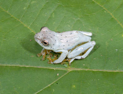 Hyperolius ocellatus